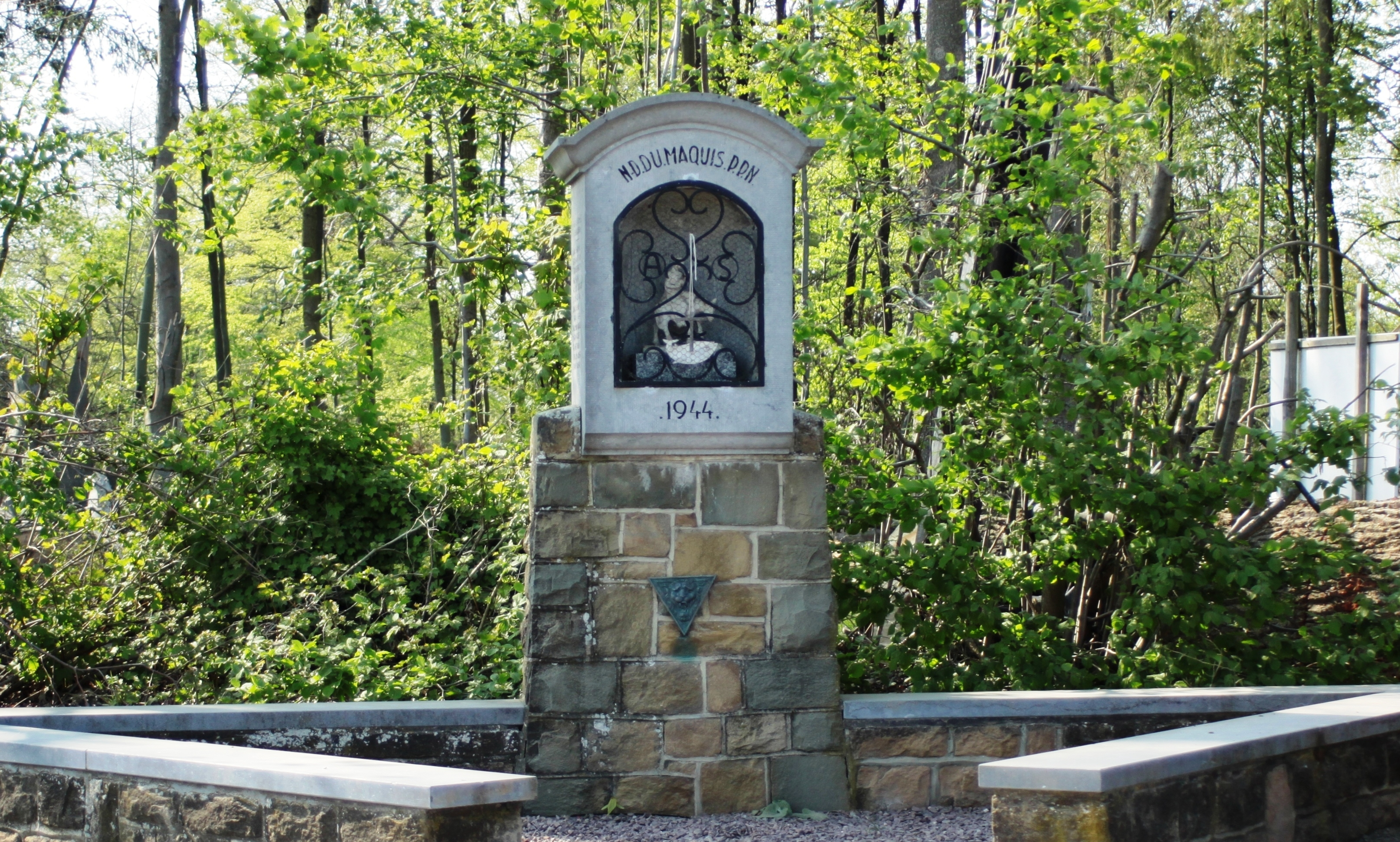 La chapelle de Notre-Dame du Maquis entre Vyle-et-Tharoul et Pailhe